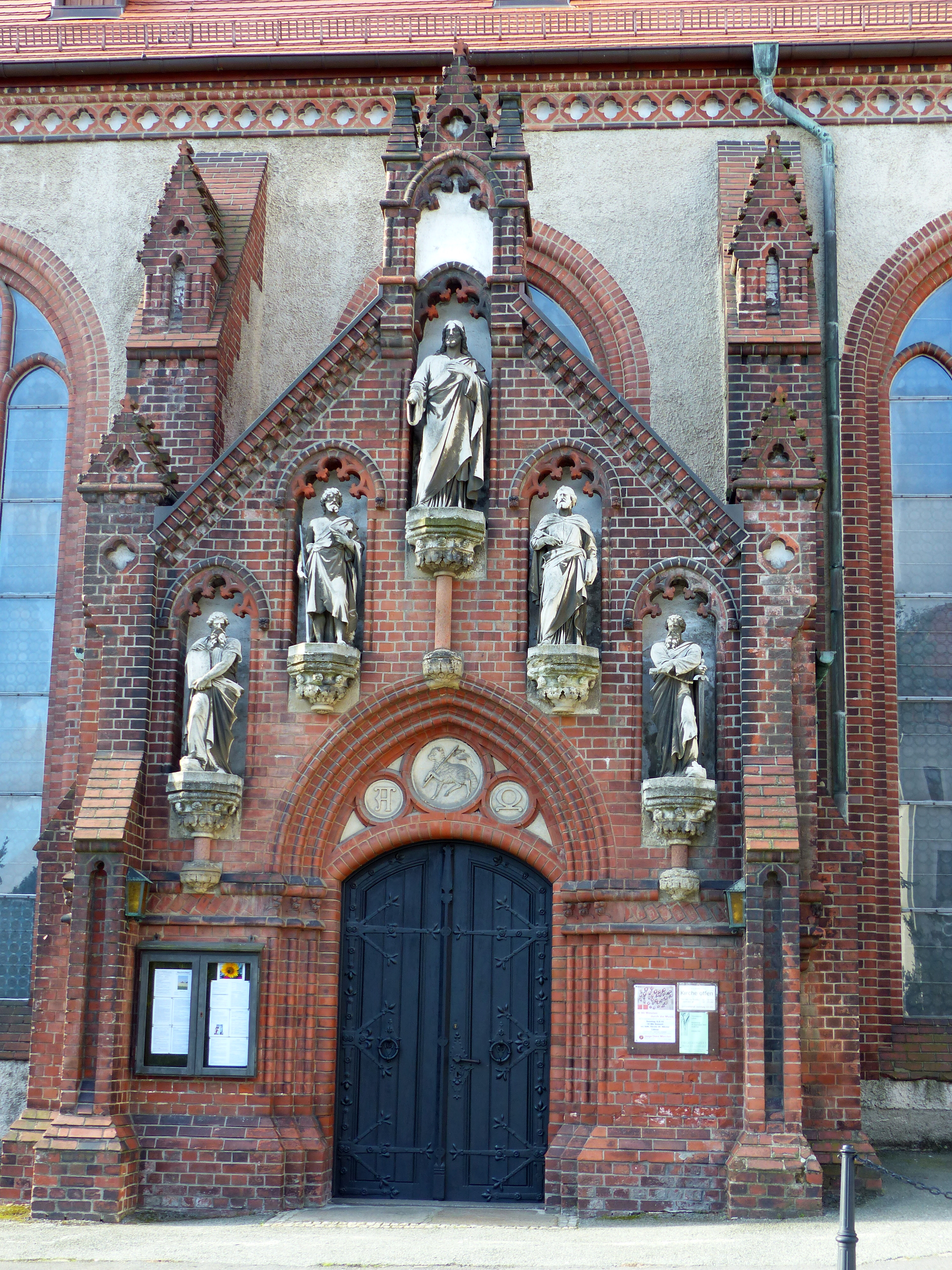 St.-Nikolai-Kirche in Löbau